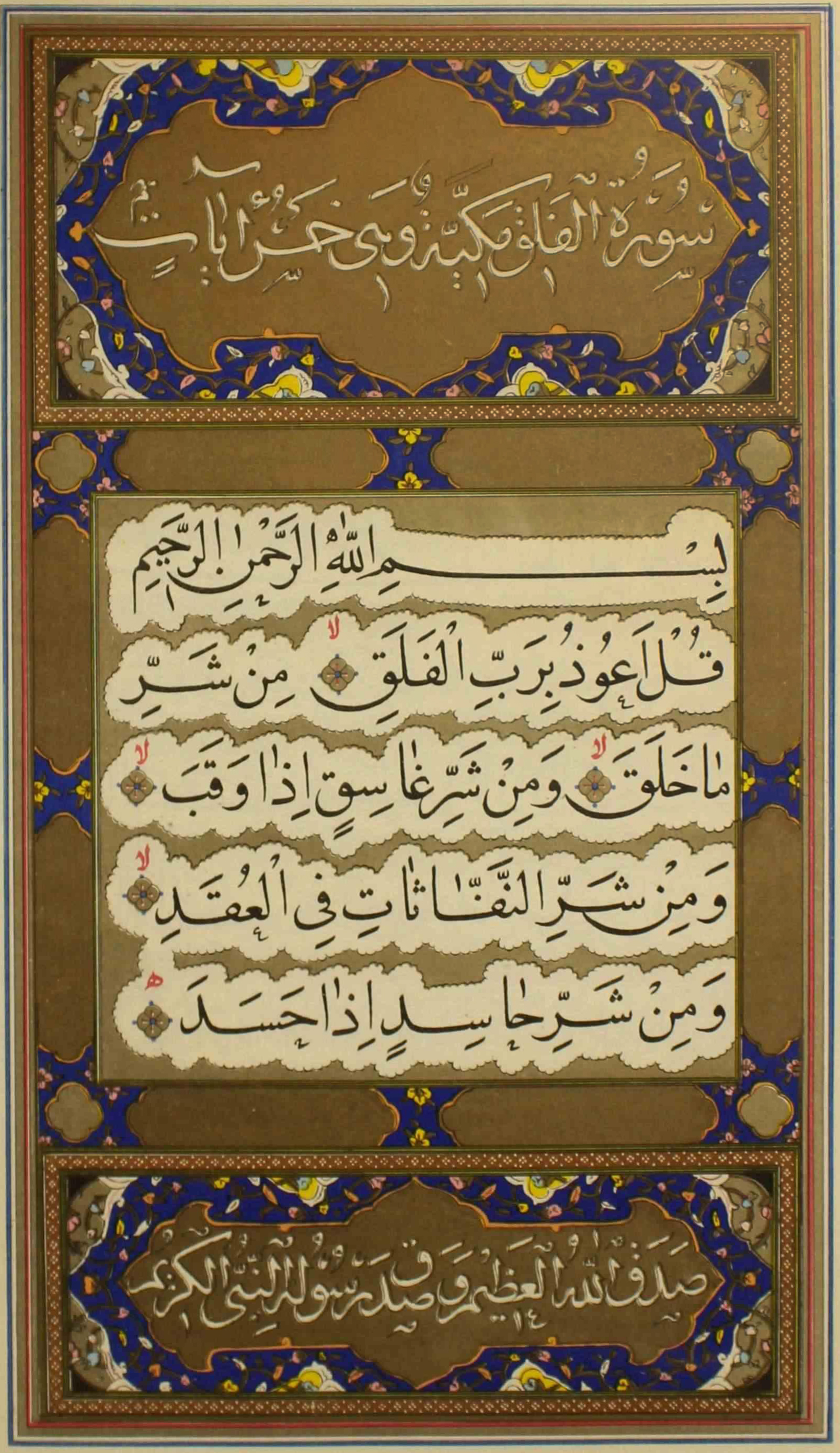 کتابت: 1117 ه.ق، اواخر دوره صفوی نگاه‌داری‌شده در کتابخانهٔ کاخ گلستان معروف به قرآن آریامهری یا پهلوی